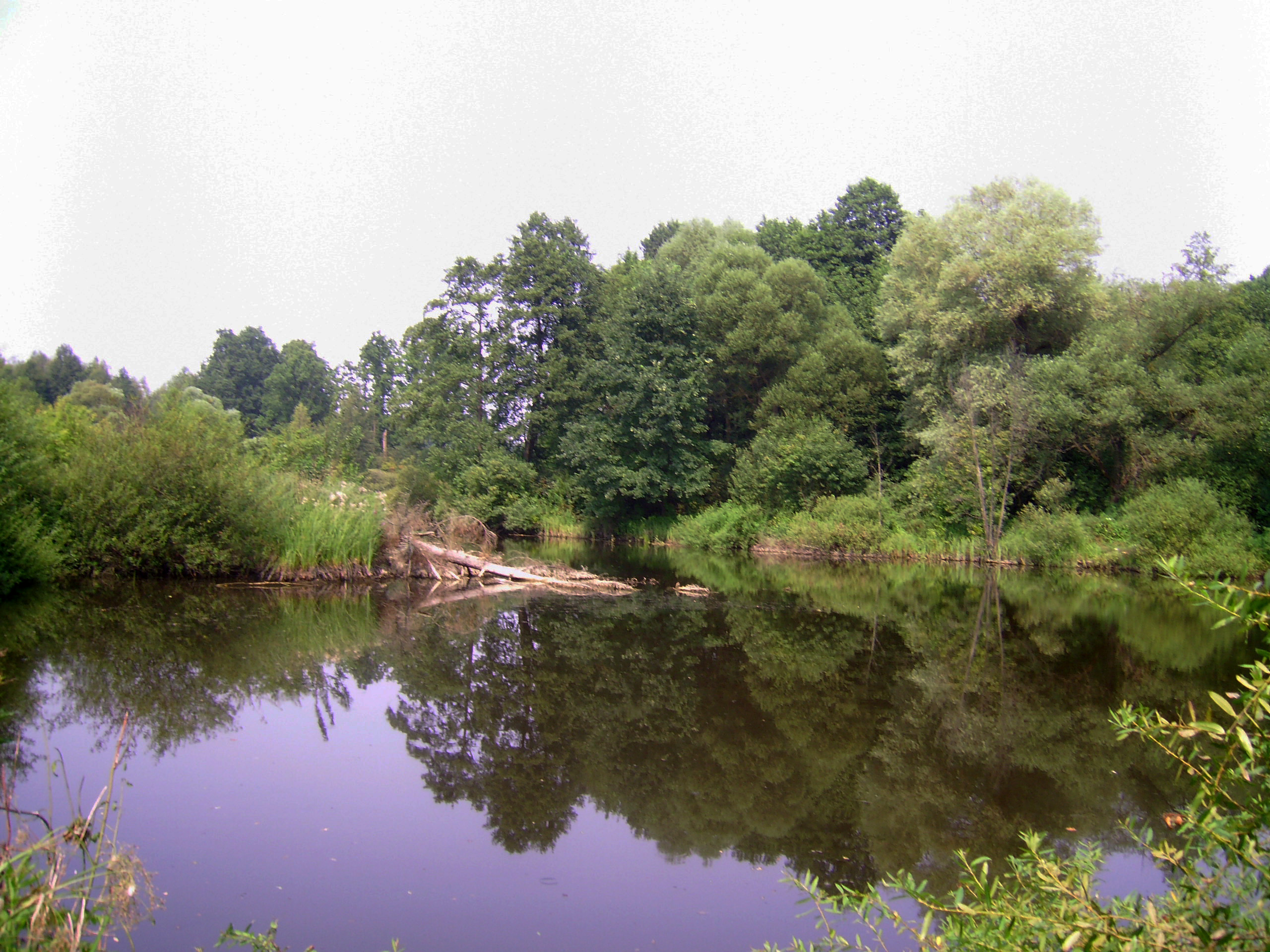 Вінницька область, Калинівський район, Сальницька сільська рада, Калинівське лісництво